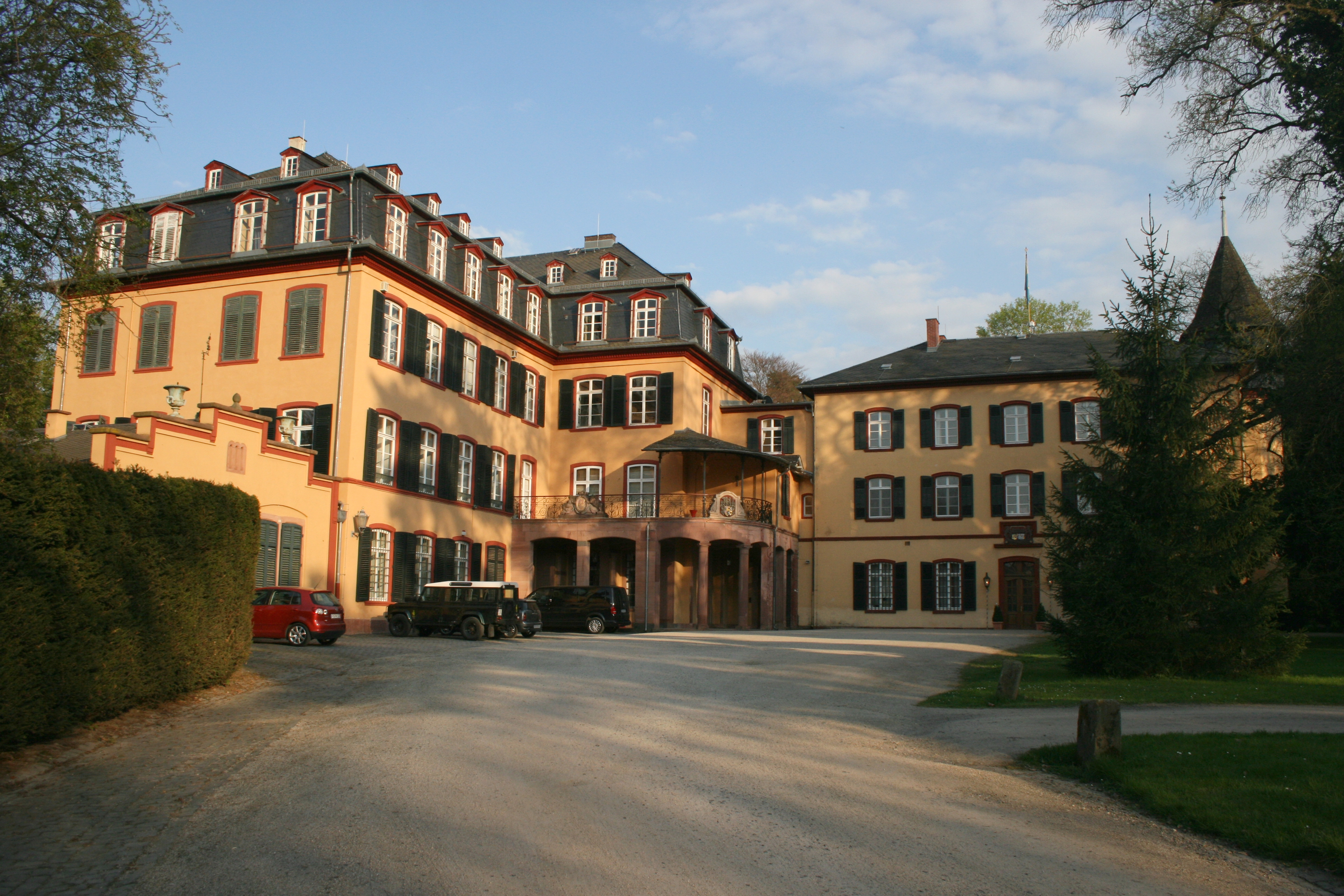 Schloss Assenheim, Niddatal-Assenheim, Wetteraukreis, Hessen. Ansicht des Hauptgebäudes der Grafen Solms-Rödelheim-Assenheim.